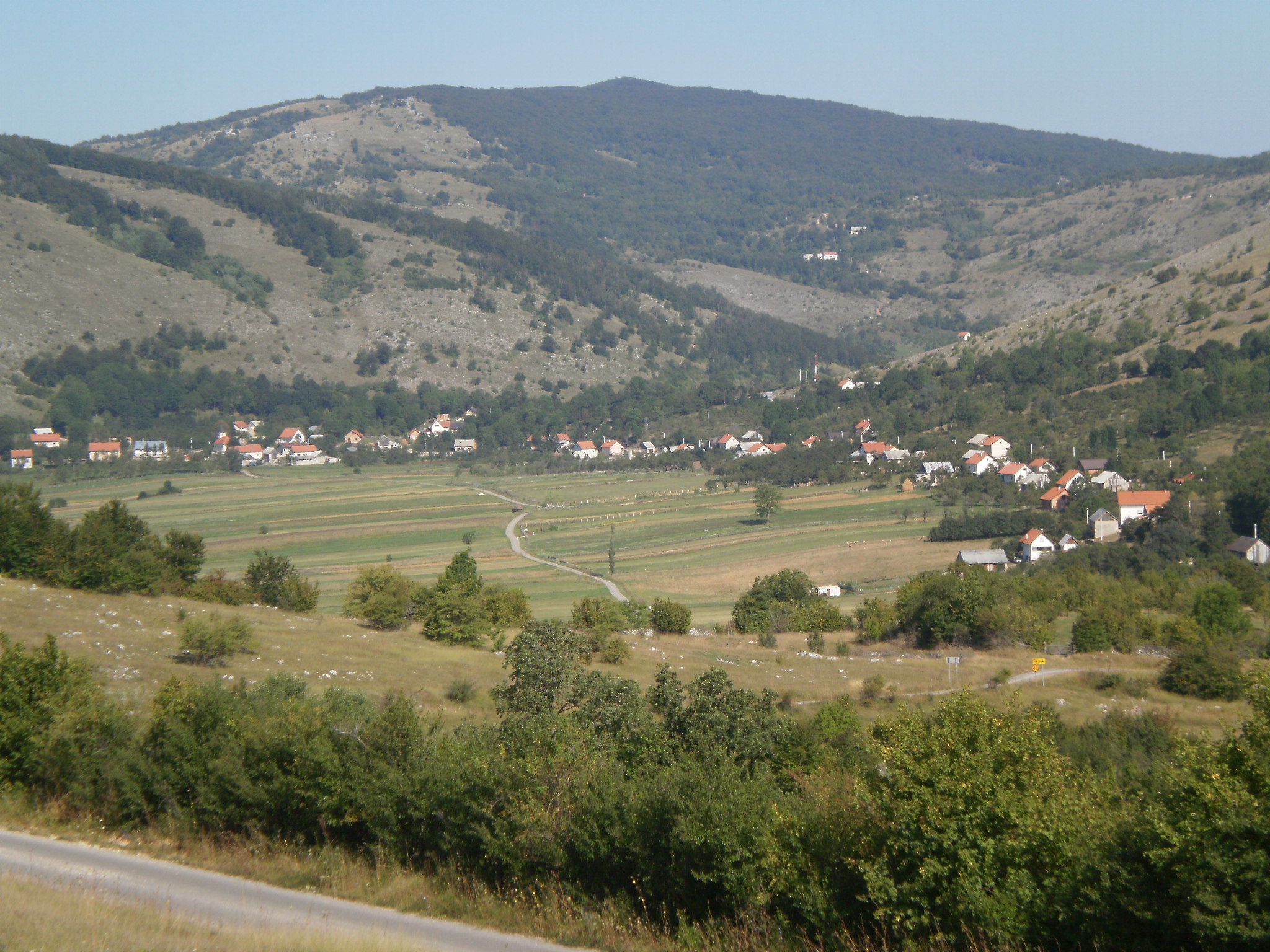 Prema Čanku